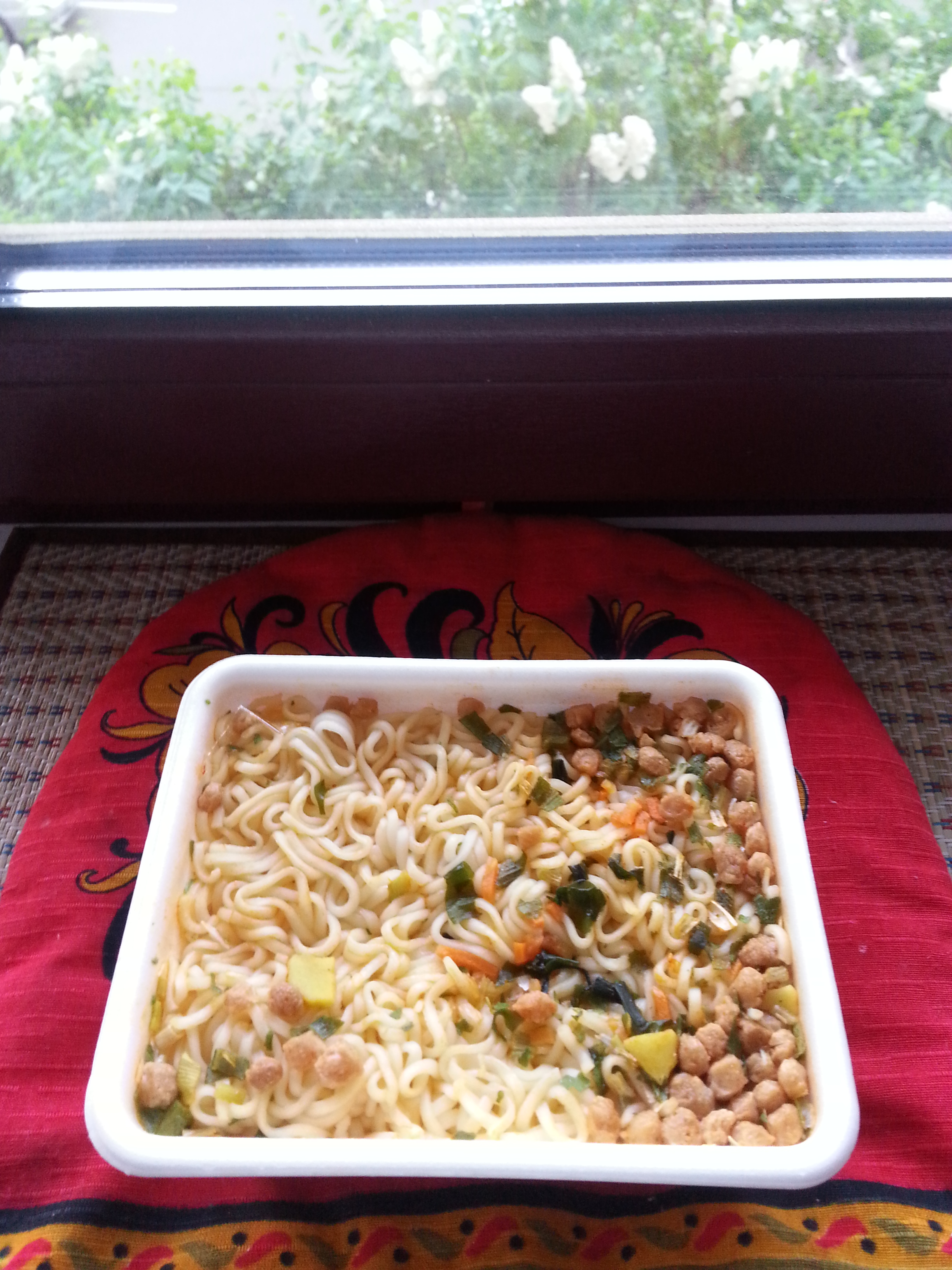 Лапша марки Доширак остывает на подоконнике